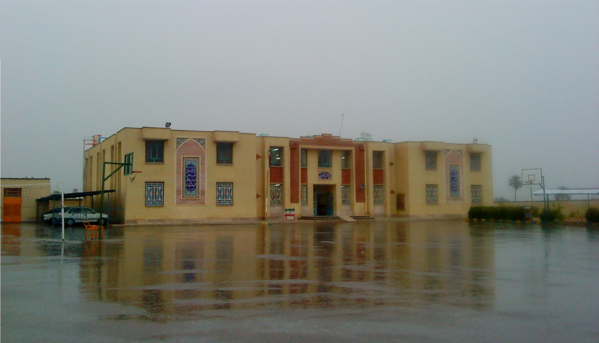 آموزشگاه راهنمایی نمونه دولتی آیت اله طالقانی فسا